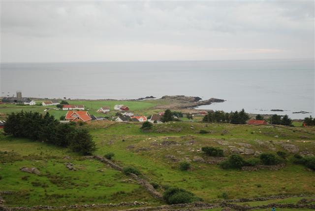 jolle